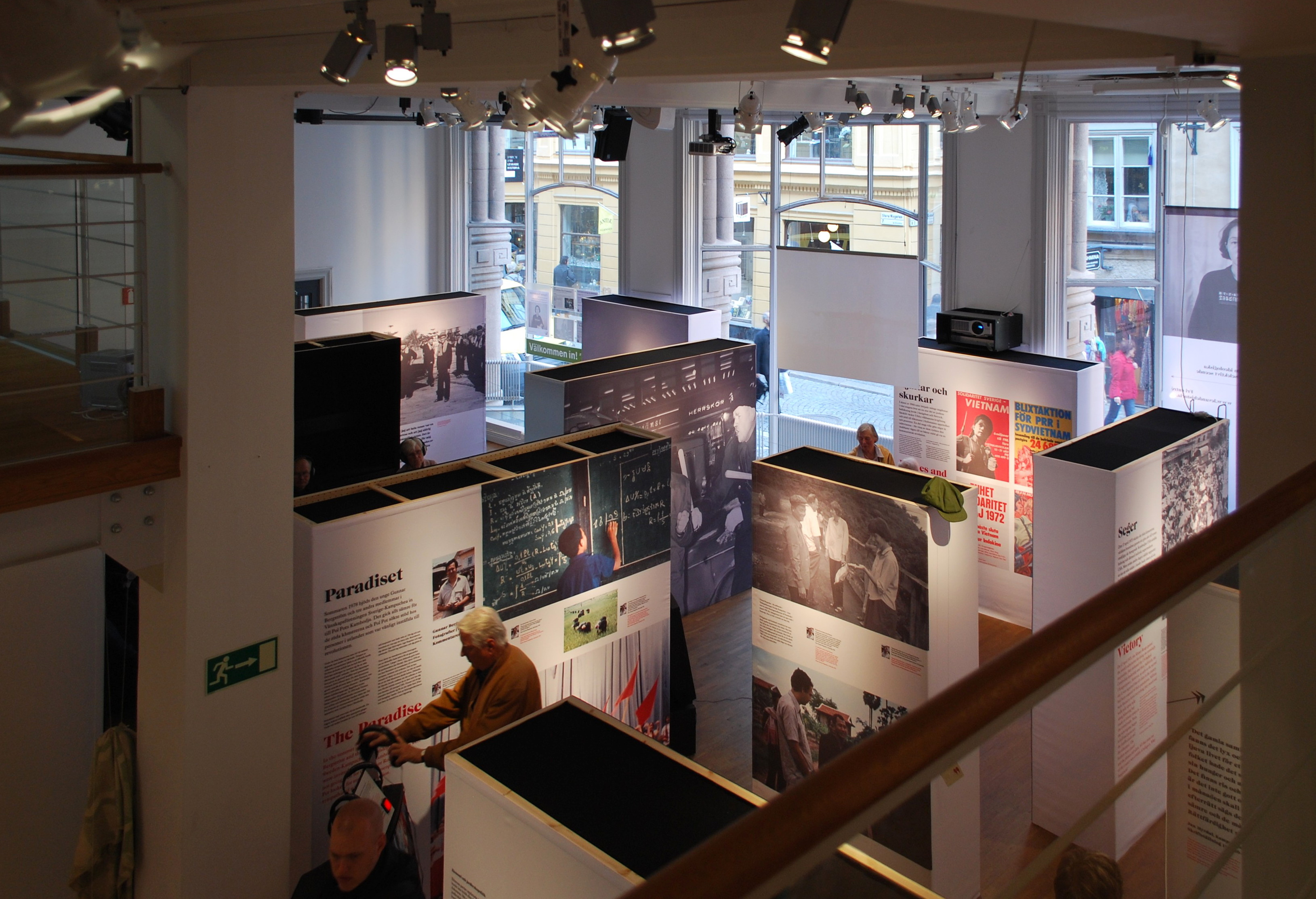 Utställningshallen, Forum för levande historia, Stora Nygatan 10-12, Stockholm